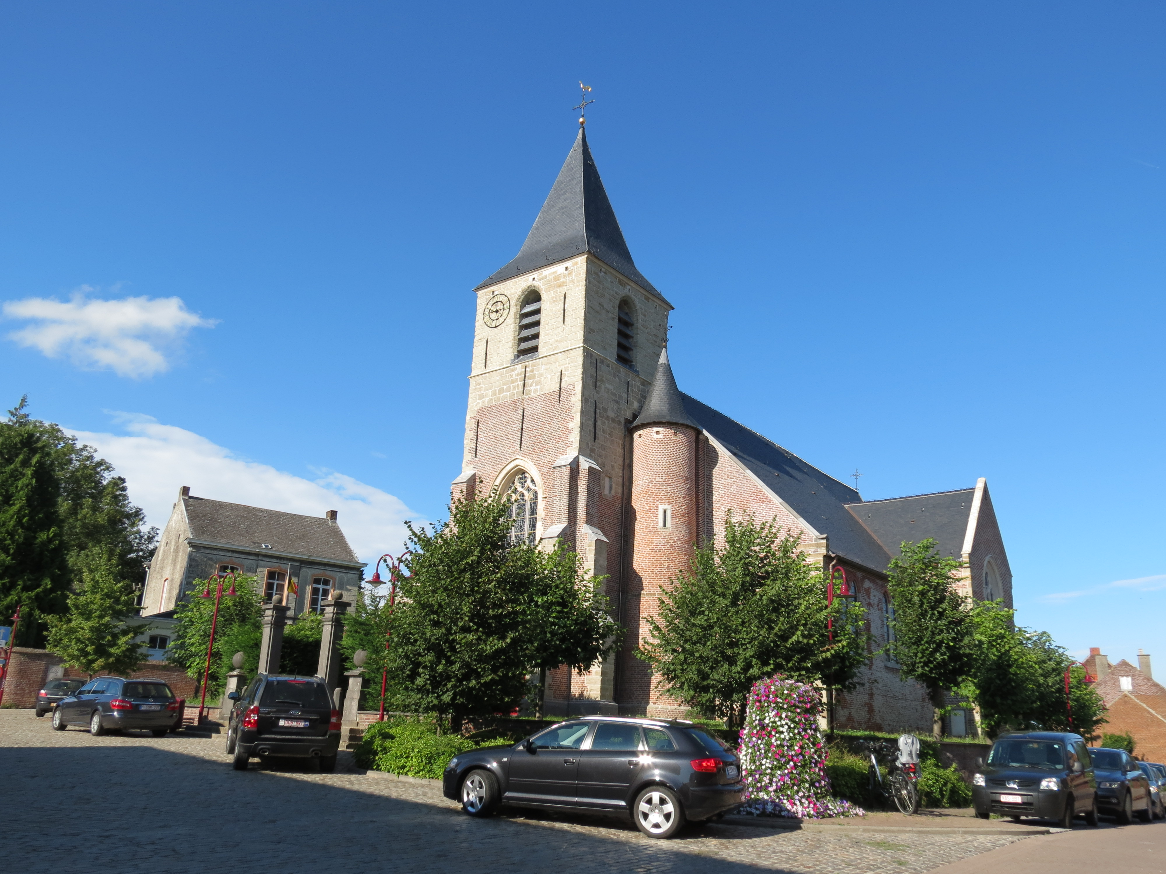 Geraardsbergen - Schendelbeke - Schendelbekeplein - Parochiekerk Sint-Amandus This photo of immovable heritage has been taken in the Flemish Region